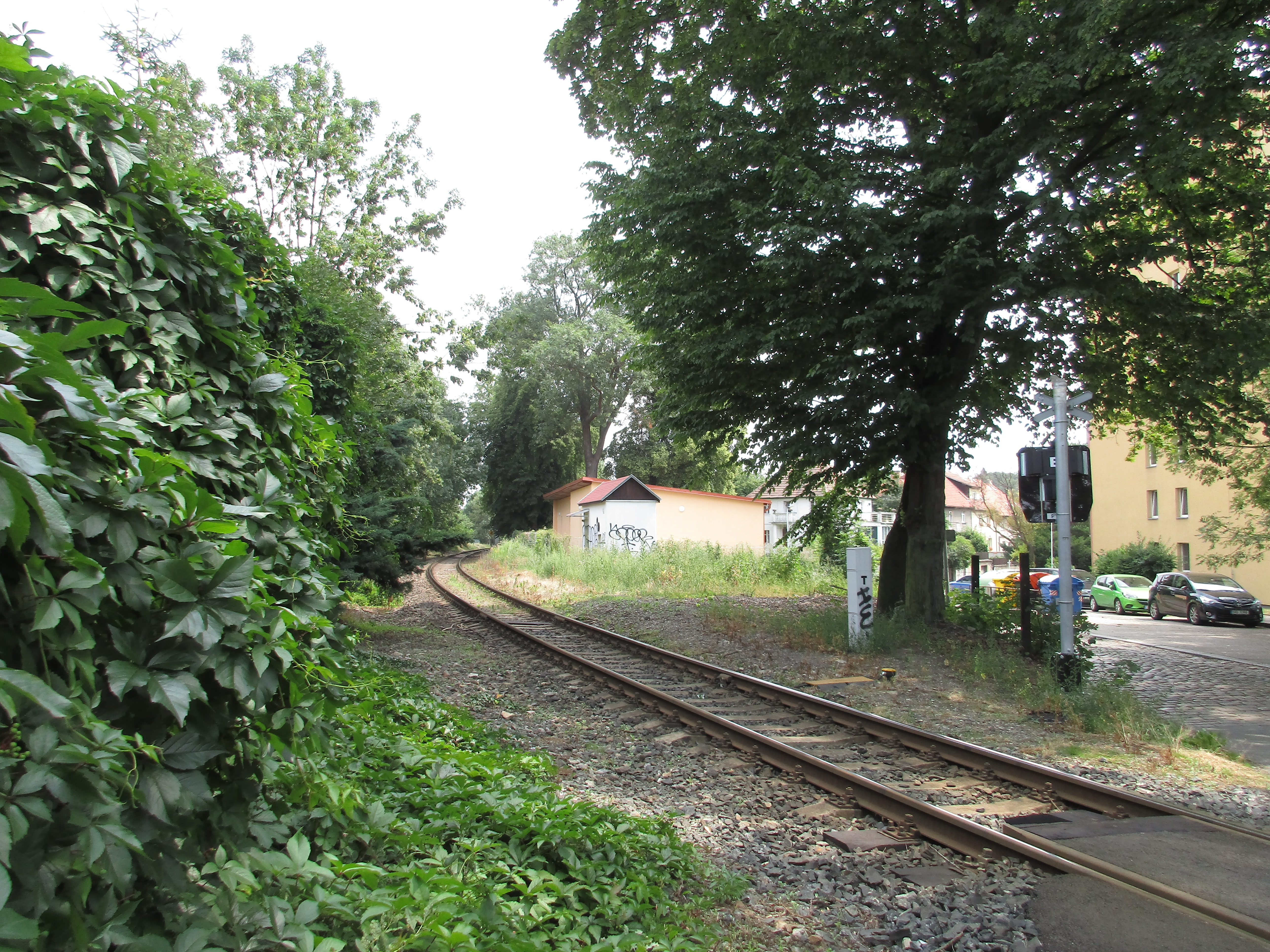 Praha-Liboc, bývalá železniční zastávka (1863-1984).